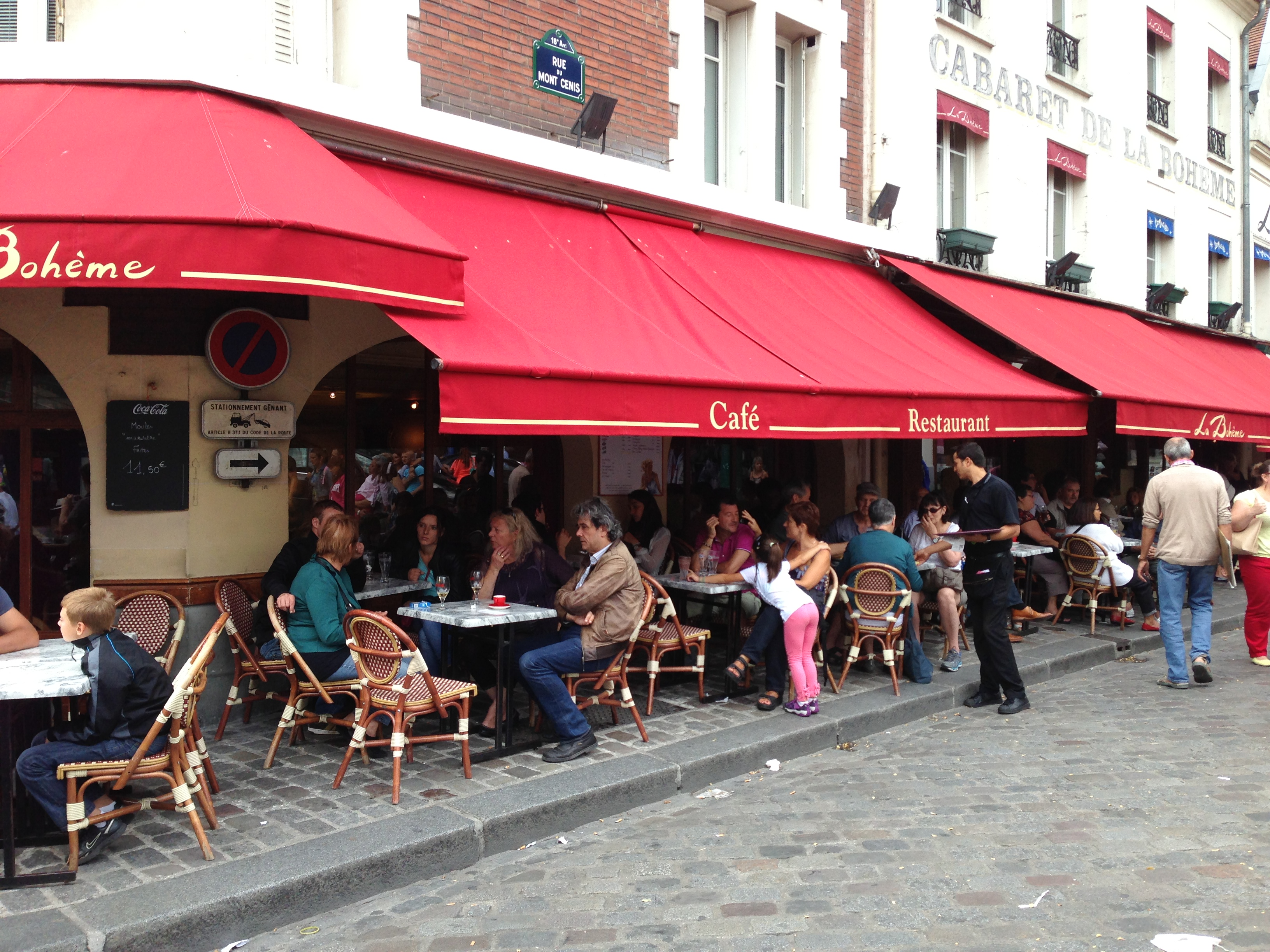 Cabaret de la Boheme, Paris.